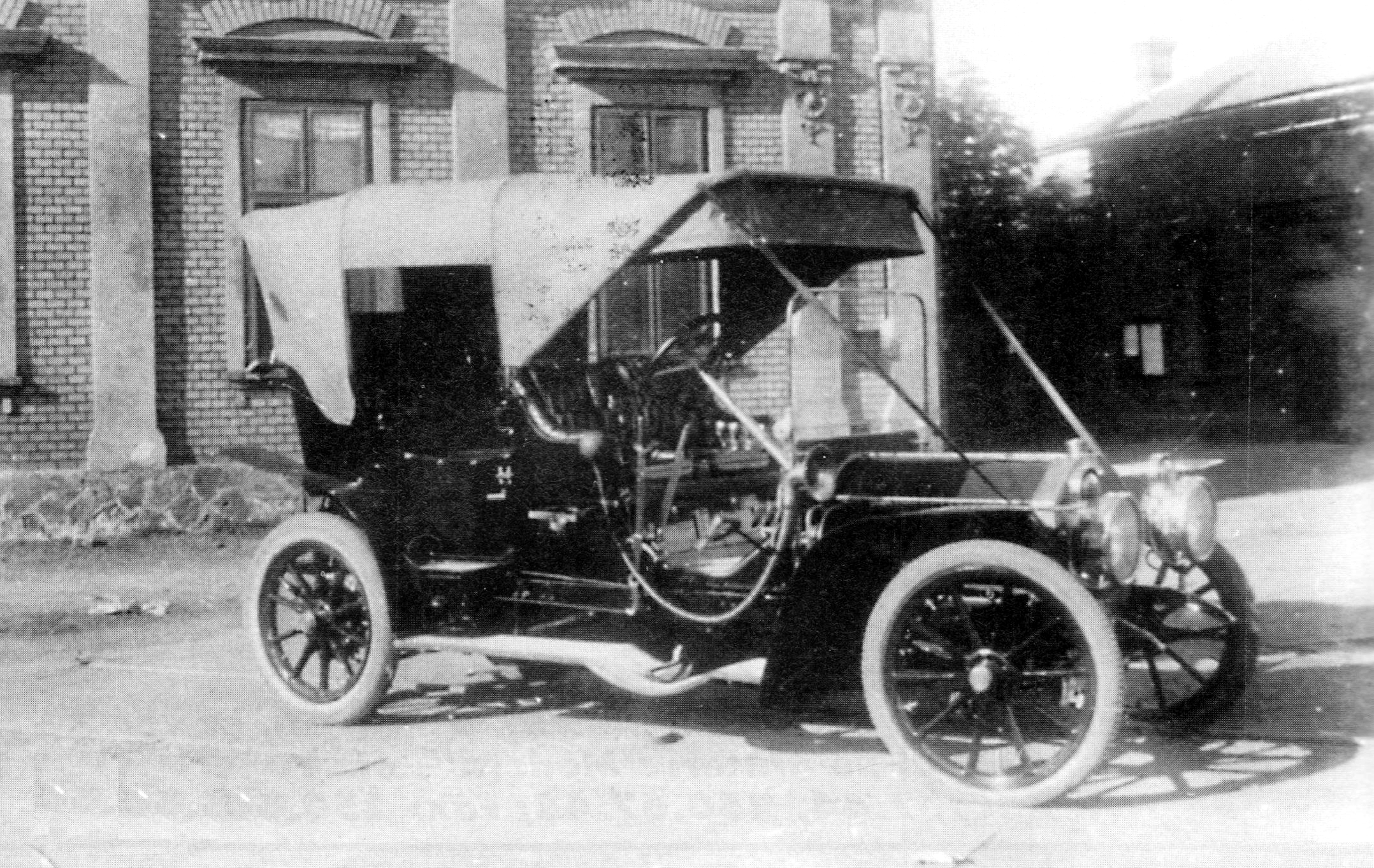 MARTA 35/45 HP Dublu-Phaeton karosszériás